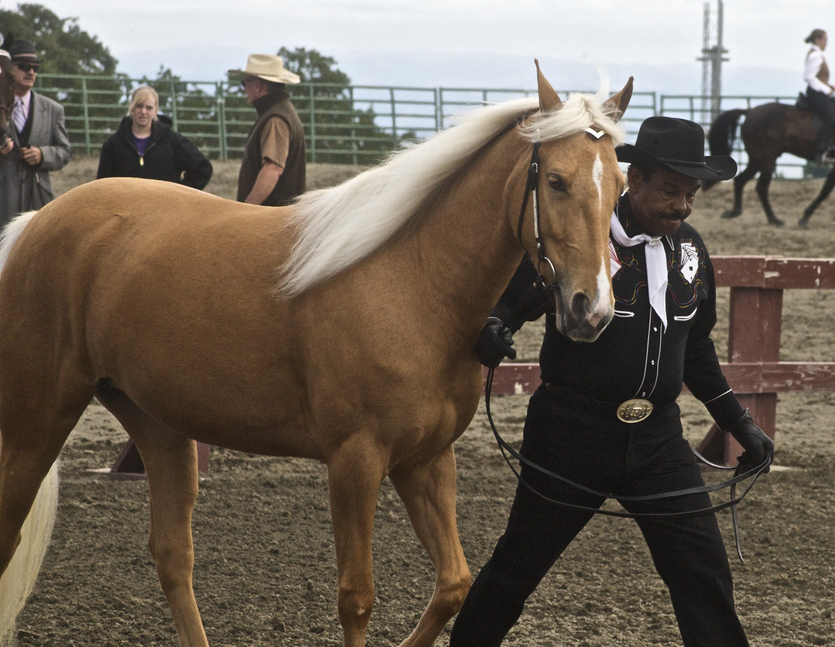 Tennessee Walking Horse